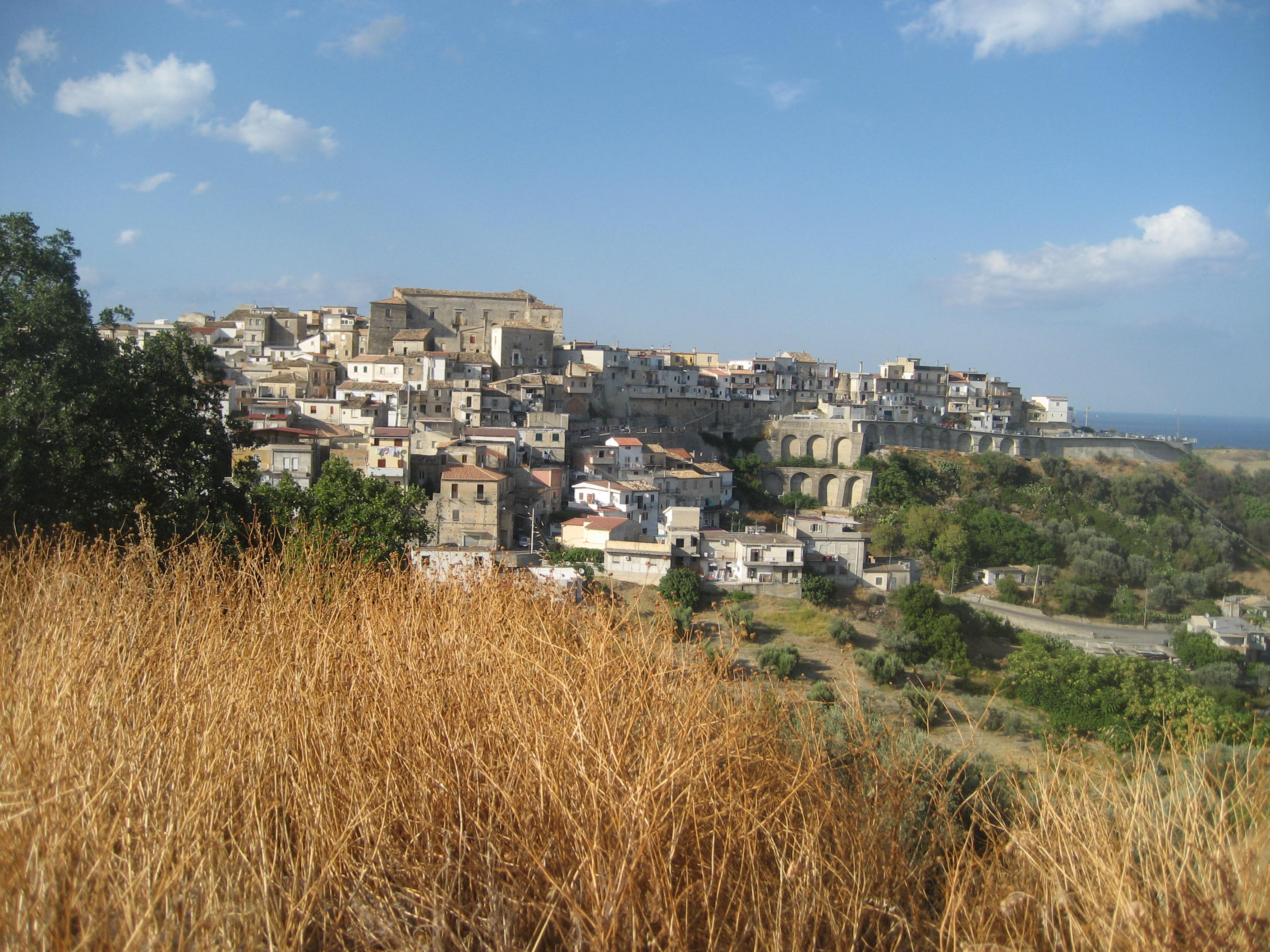 Monasterace_superiore